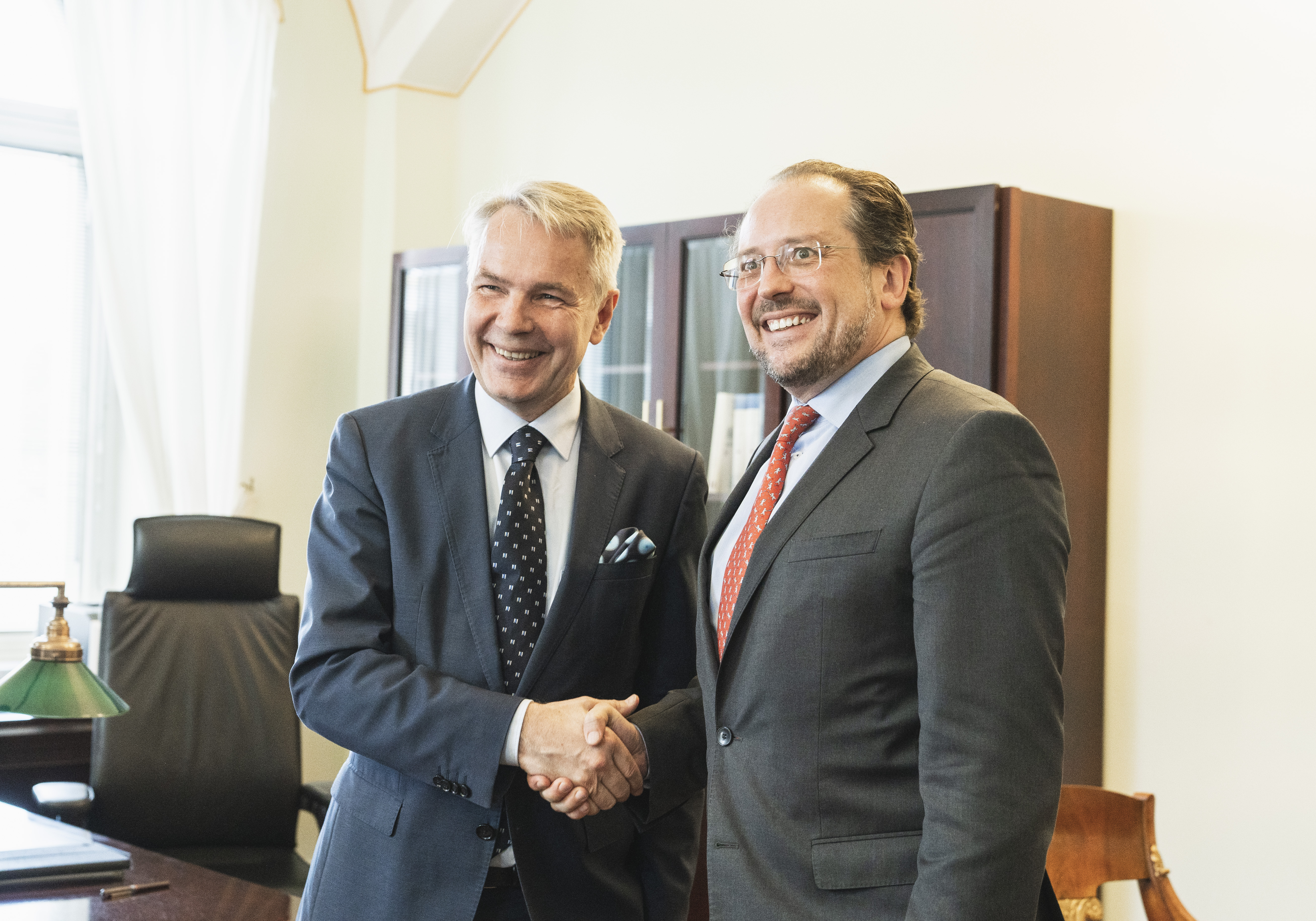 Alexander Schallenberg besucht Helsinki für bilaterale Gespräche, am 24. Juni 2019 Copyright: BMEIA/ Eugénie Berger